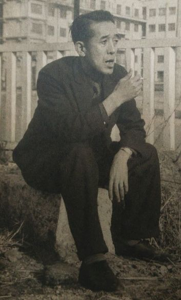 東辰三